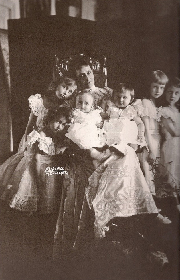 Maria Ana de Bragança, Grã-Duquesa de Luxemburgo, com seus filhos.